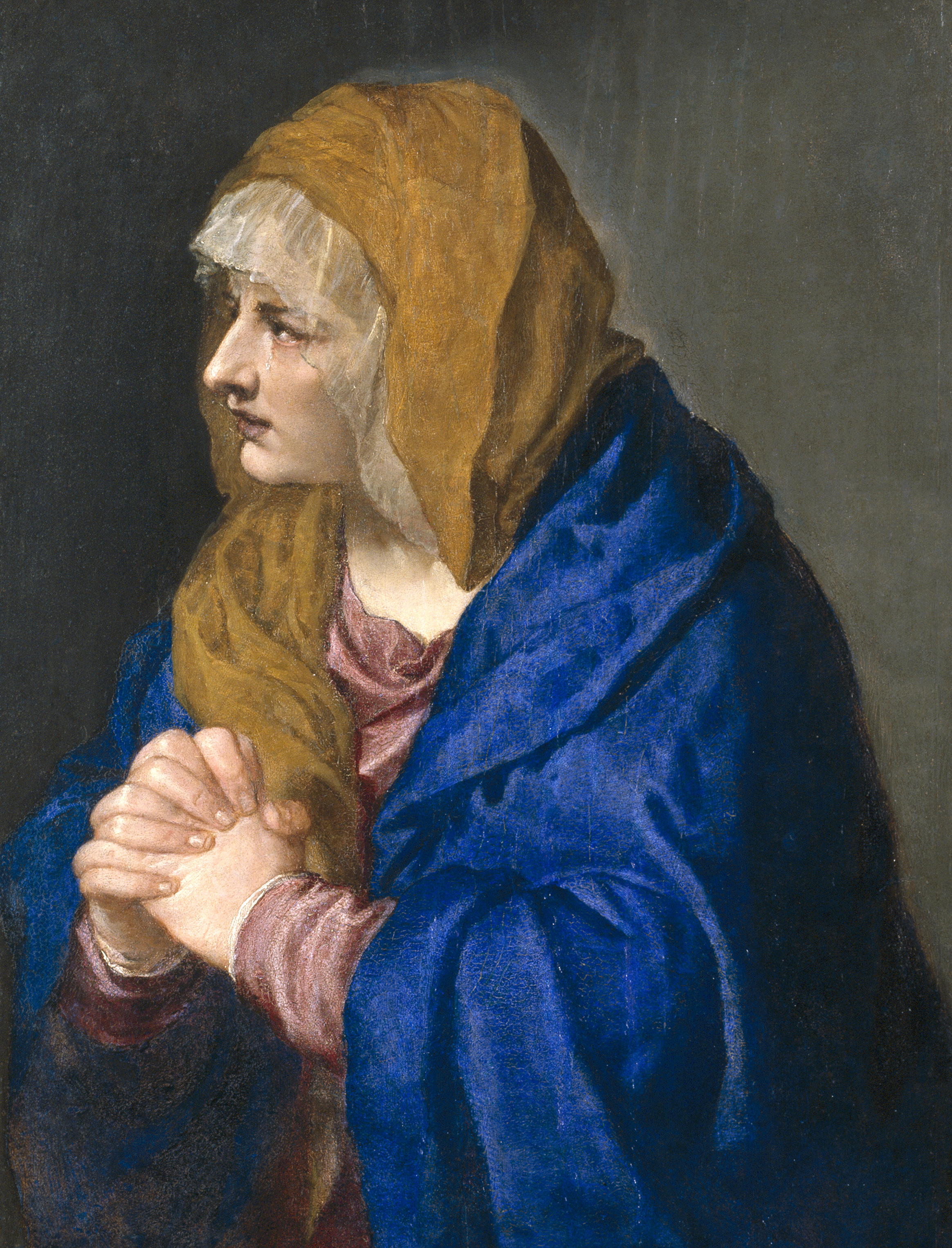 La obra representa a la Virgen María, madre de Jesucristo, en actitud dolorosa.